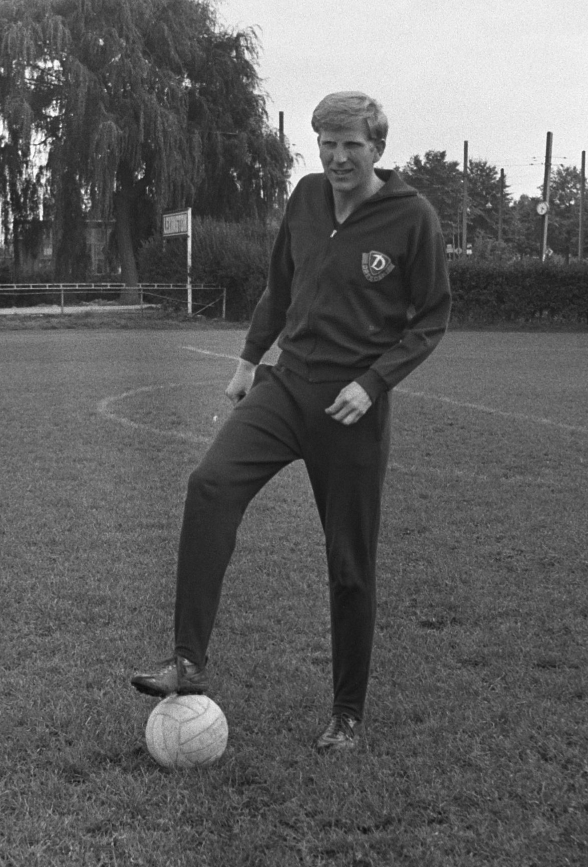 Collectie / Archief : Fotocollectie Anefo Reportage / Serie : [ onbekend ] Beschrijving : Dynamo Dresden traint op Ajax veld Amsterdam Datum : 13 september 1971 Locatie : Amsterdam, Noord-Holland Trefwoorden : sport, trainingen, voetbal Persoonsnaam : Dynamo Dresden Instellingsnaam : AJAX Fotograaf : Peters, Hans / Anefo Auteursrechthebbende : Nationaal Archief Materiaalsoort : Negatief (zwart/wit) Nummer archiefinventaris : bekijk toegang 2.24.01.05 Bestanddeelnummer : 924-9299